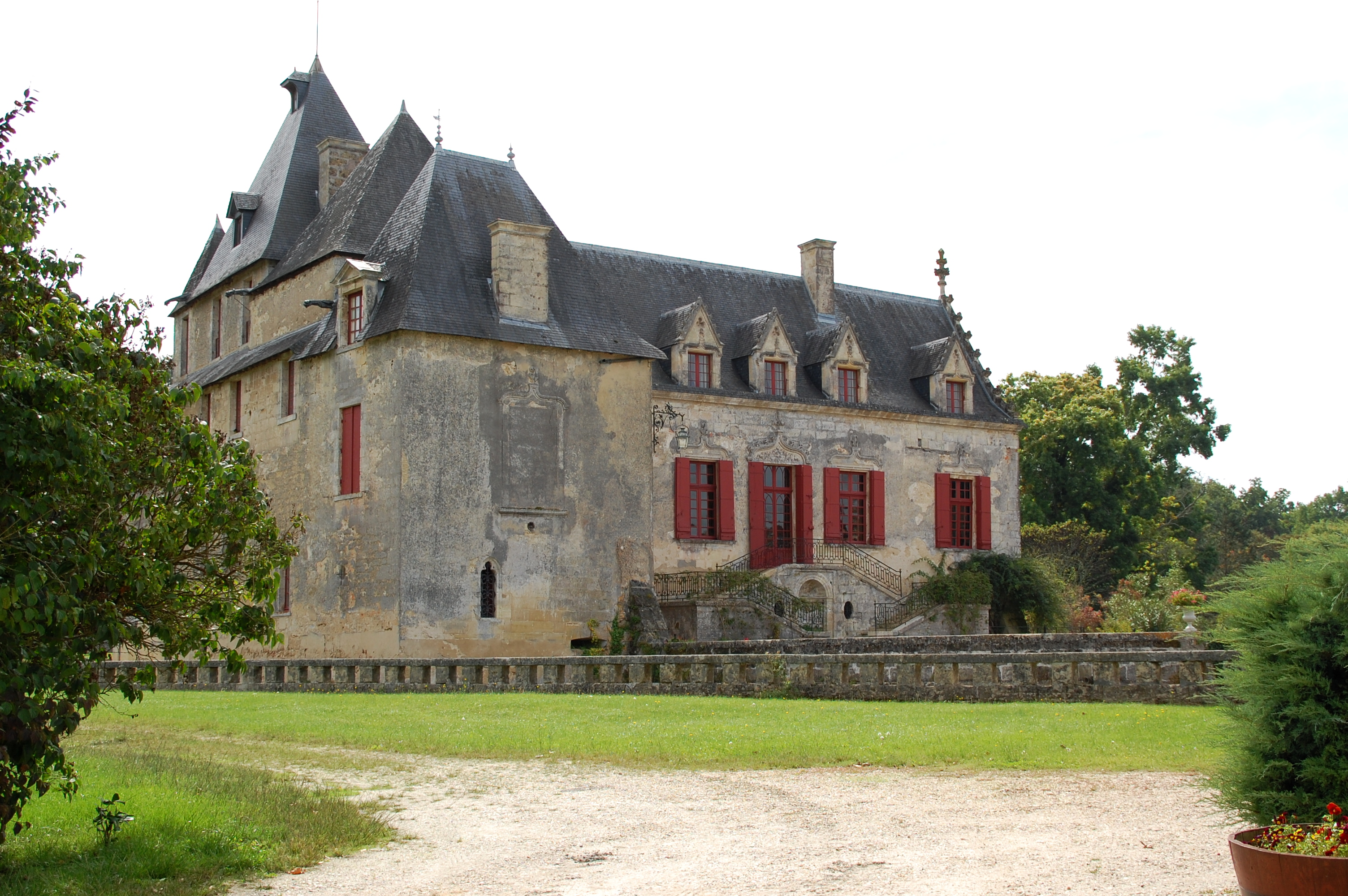 Château d'Olivier (Inscrit) .